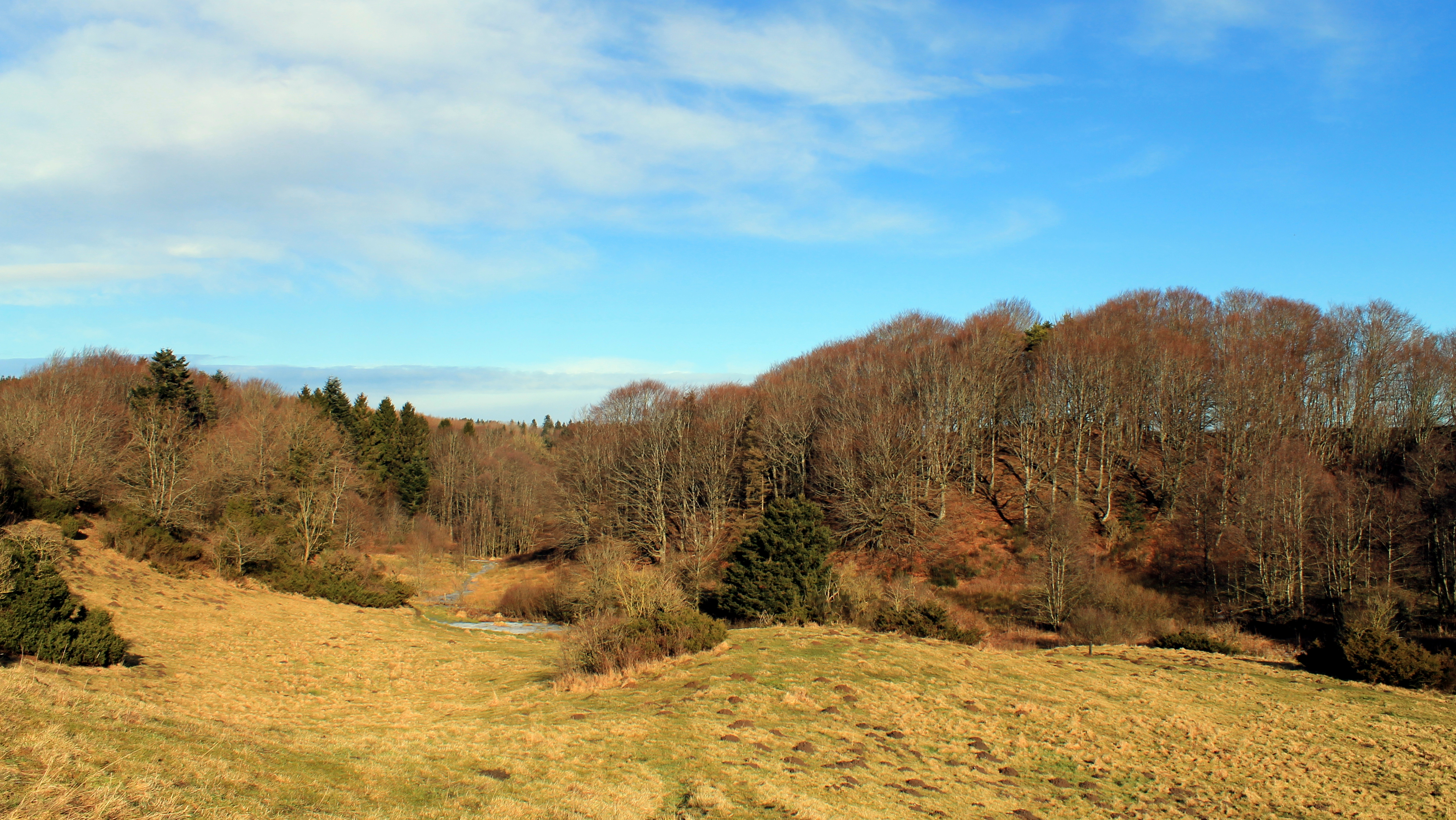 Nymølle Bæk (fredet område)